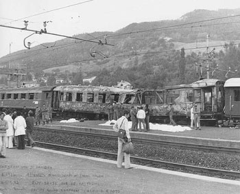 Il treno Italicus dilaniato dall'esplosione di una bomba nei pressi di San Benedetto Val di Sambro (BO) il 4 agosto 1974